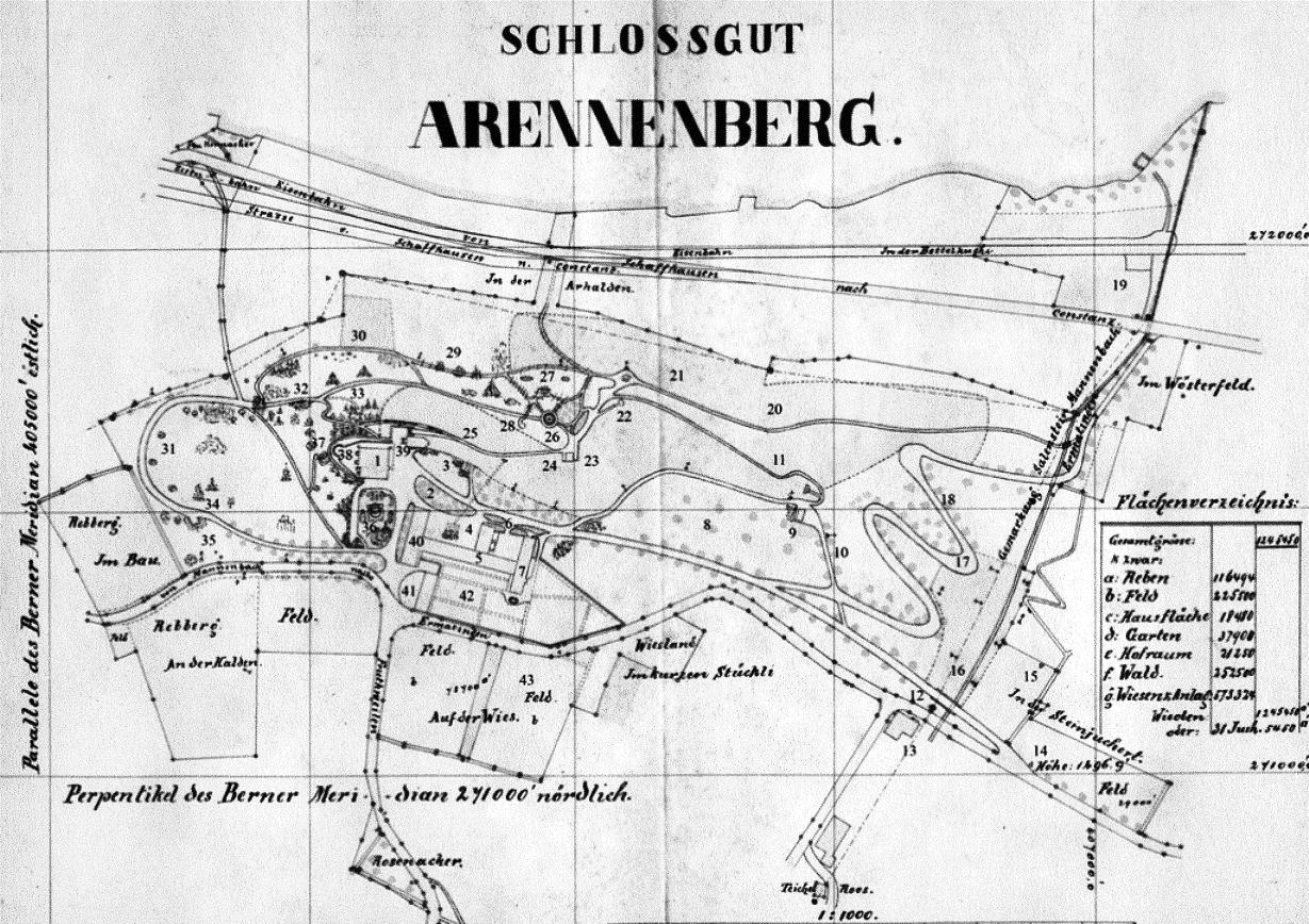 Plan des Parks Arenenberg, Schweiz